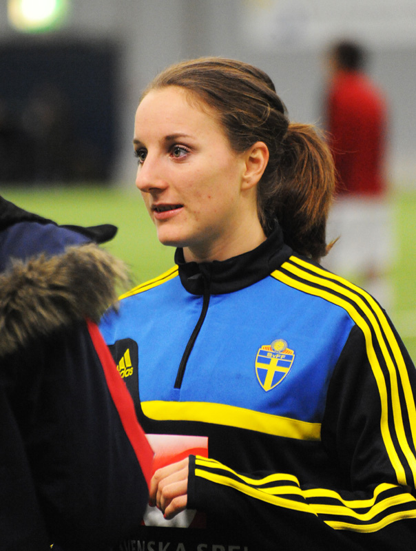 a_36_7576